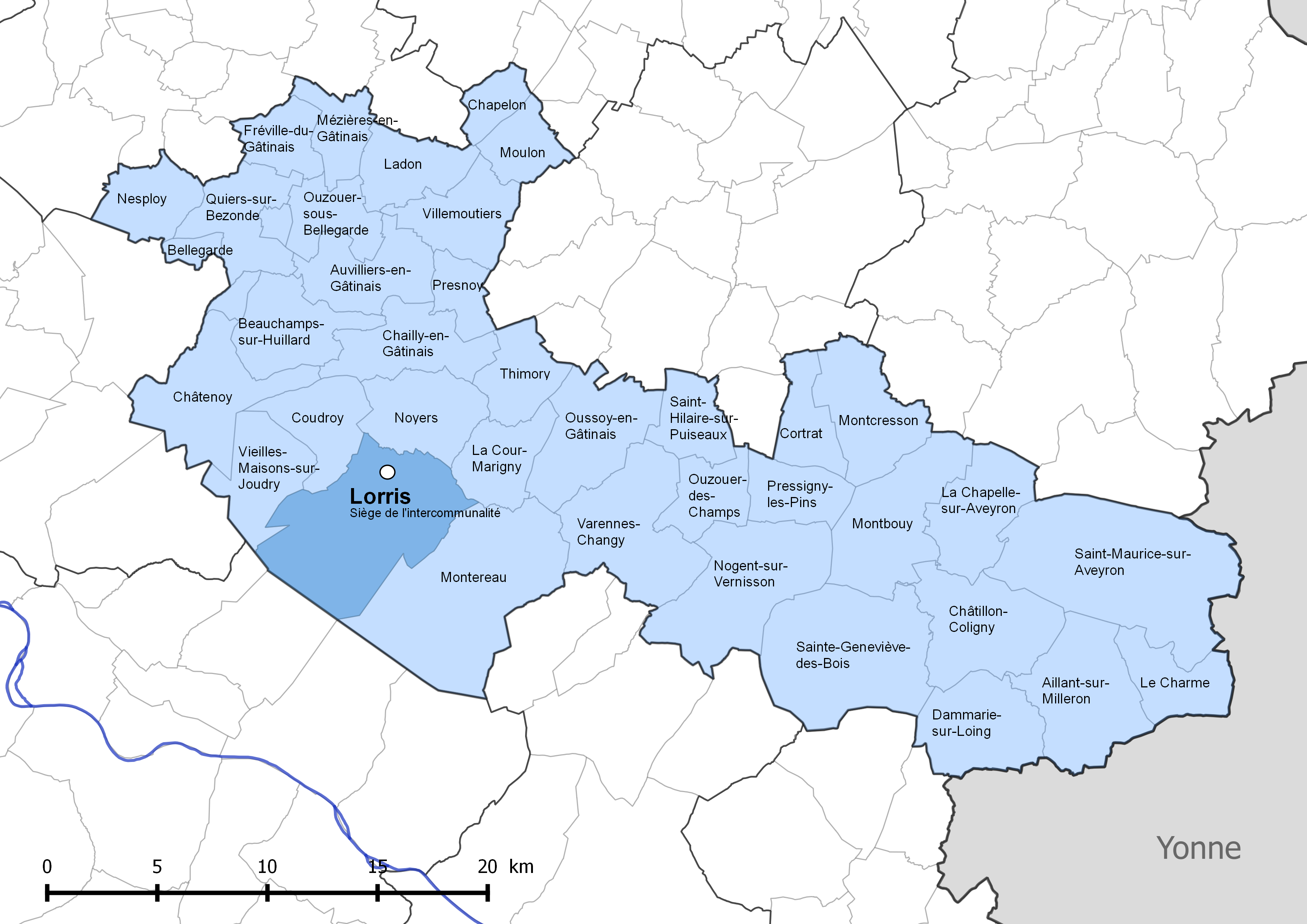 Périmètre de la communauté de communes Canaux et forêts en Gâtinais - Situation de la commune de Lorris.